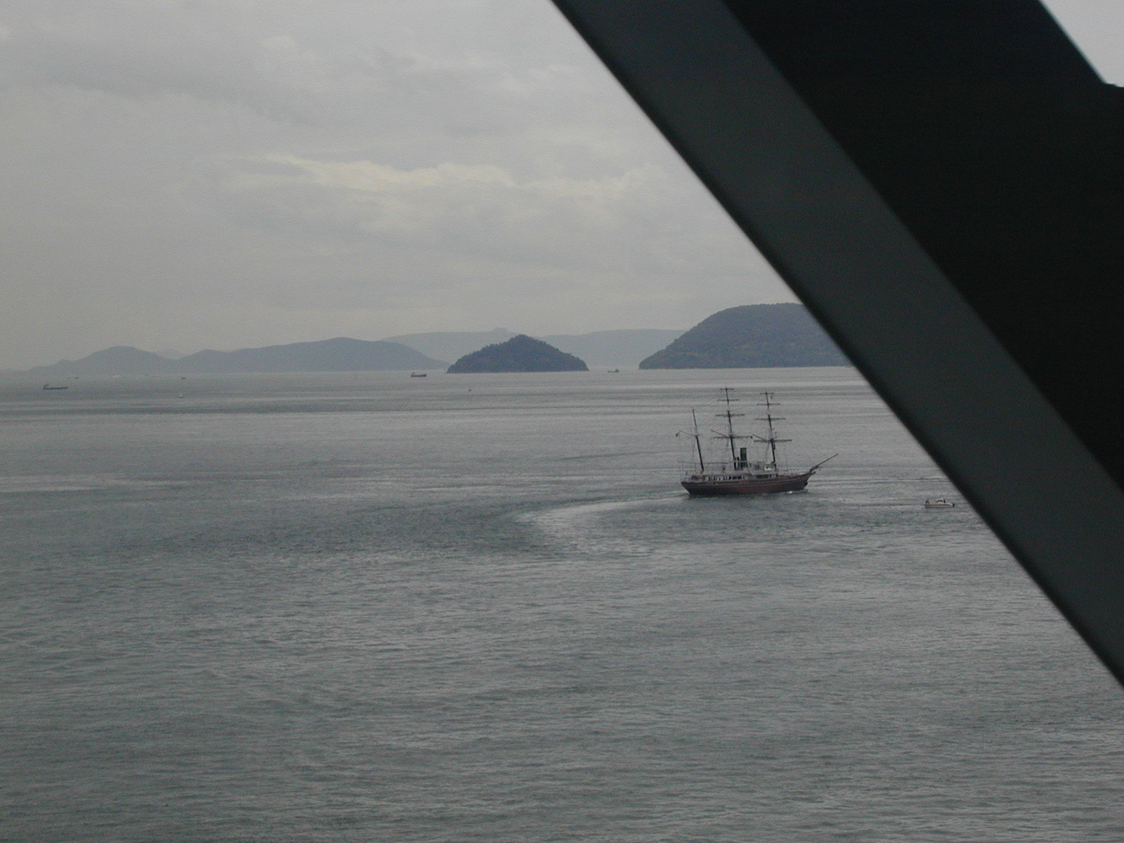 Ponte Seto Ohashi. La foto è stata scattata da me il 10 agosto 2002 dal ponte Seto Ohashi che collega l'Honshu allo Shikoku. La foto mostra la notevole altezza sul livello del mare a cui corre la ferrovia.